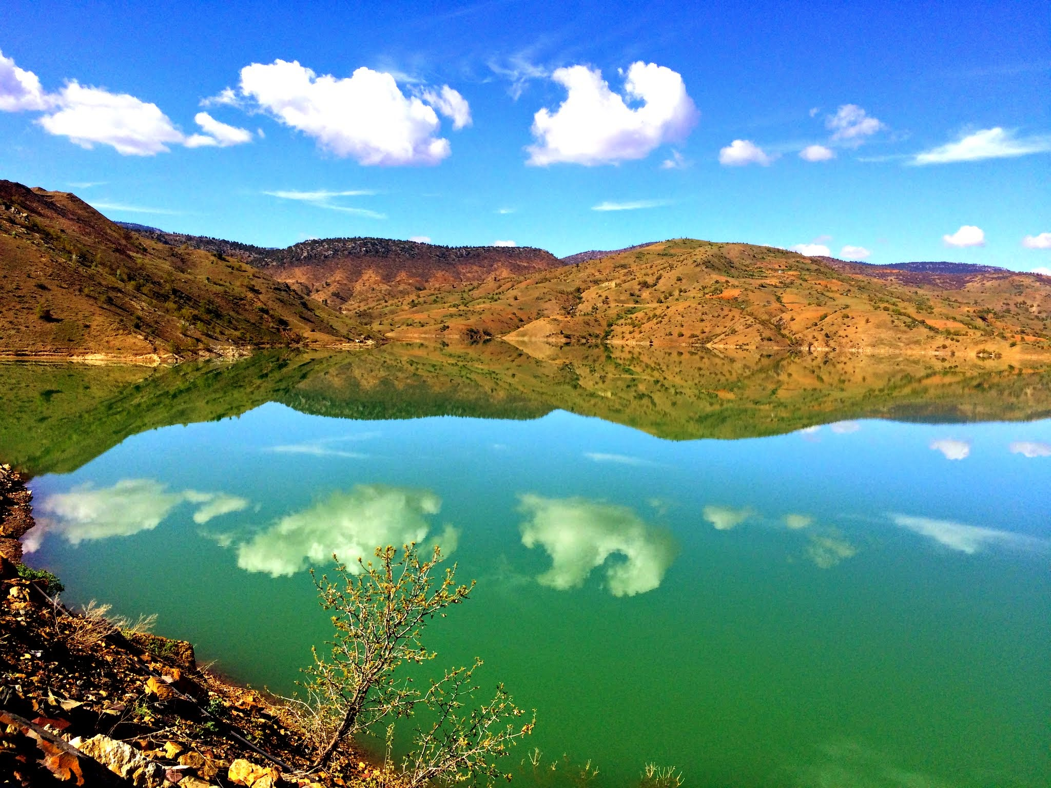 eğiste barajı